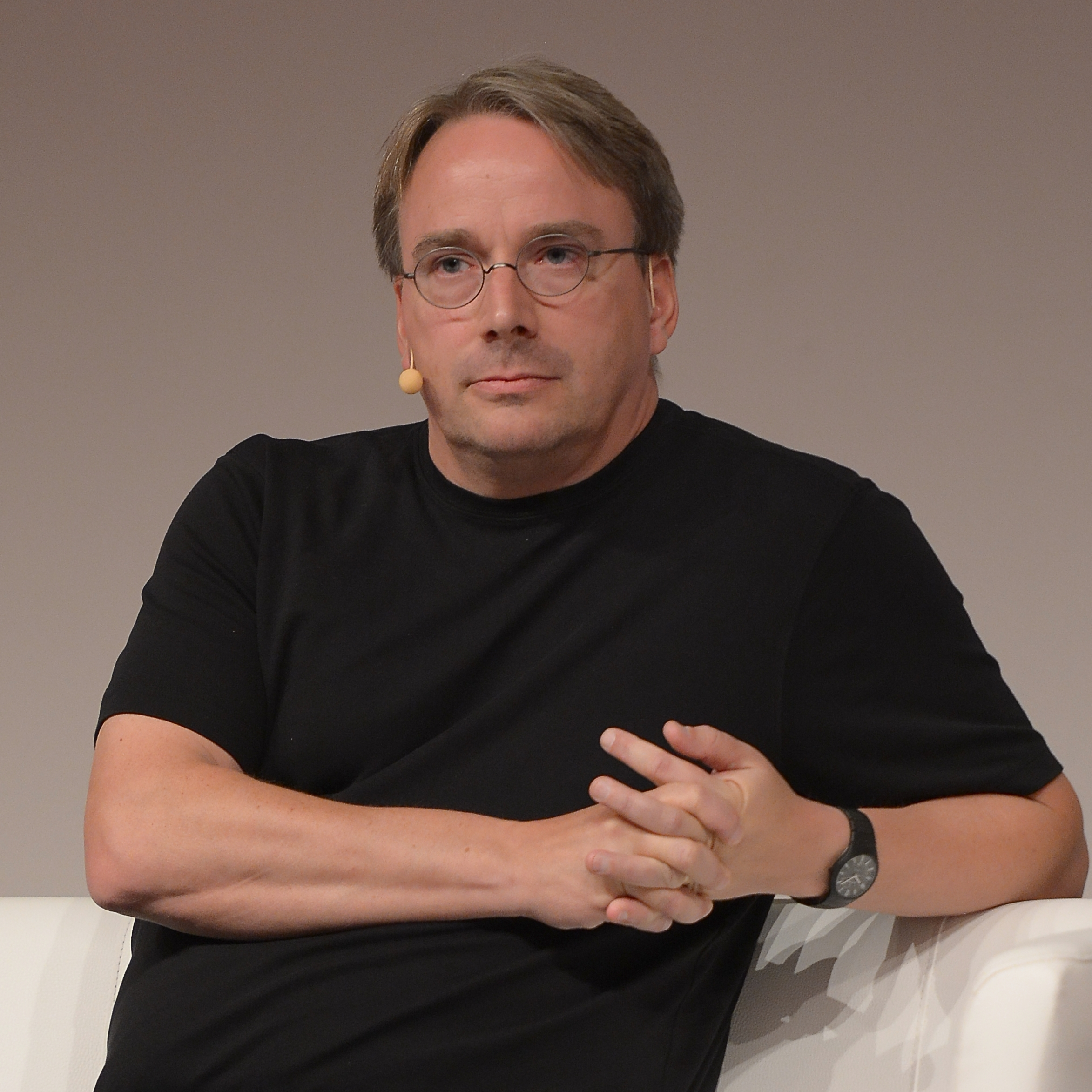 Linus Torvalds speaking at the LinuxCon Europe 2014 in Düsseldorf